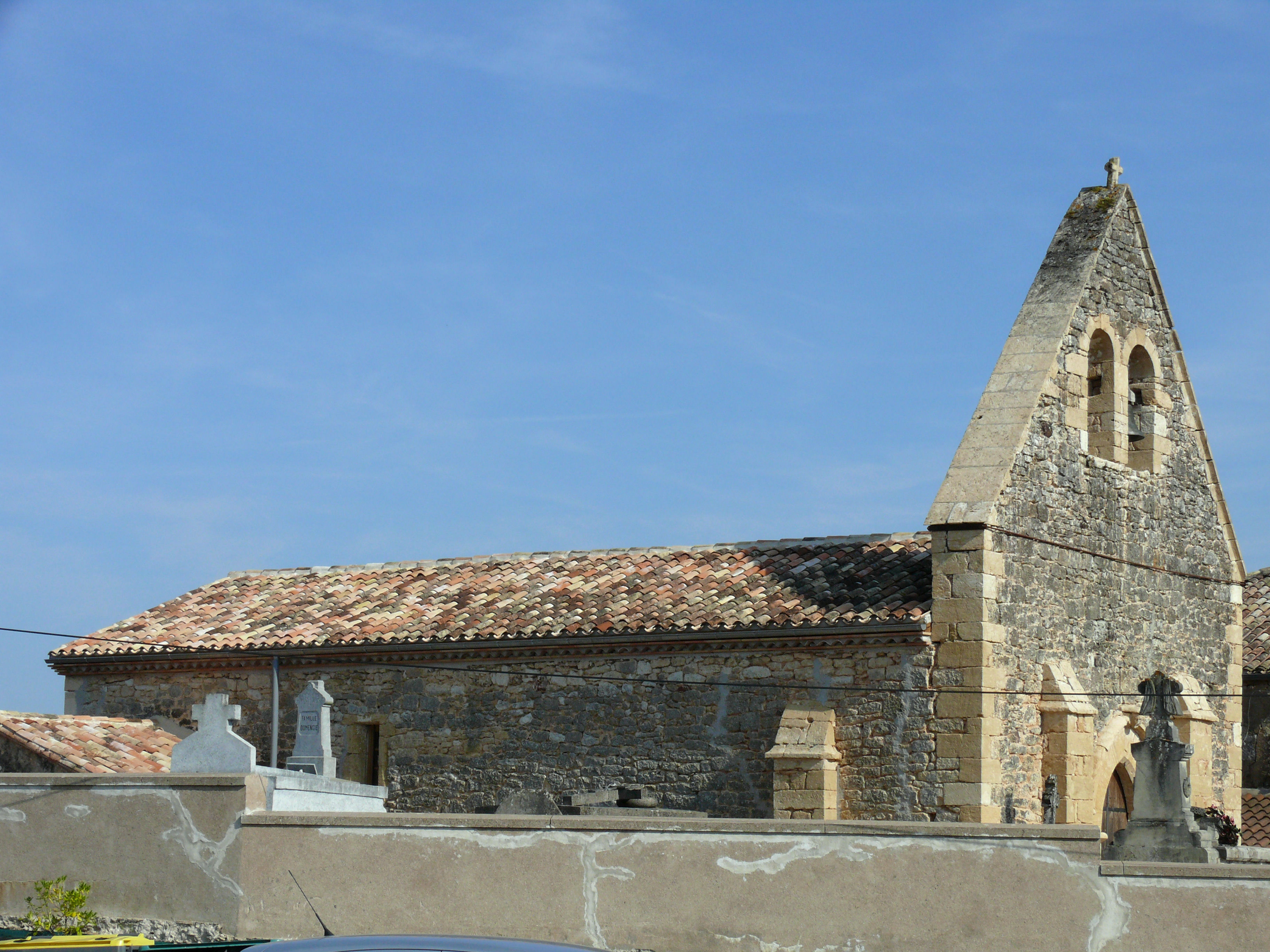 Paulhiac - Genibrède - Eglse - Ensemble